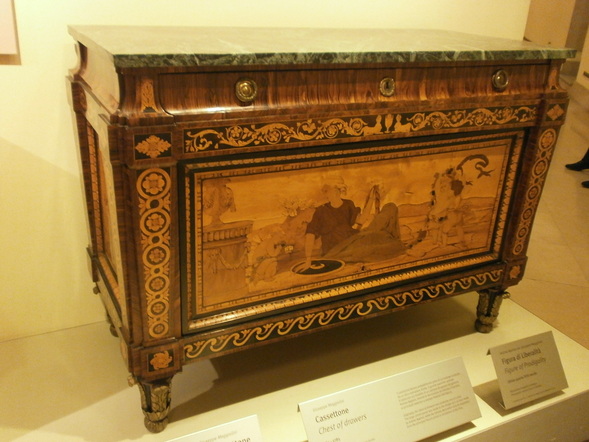 Cassettone - Giuseppe Maggiolini - 1780-85 - legno impagliacciato e intarsiato, bronzo dorato - chest of drawers